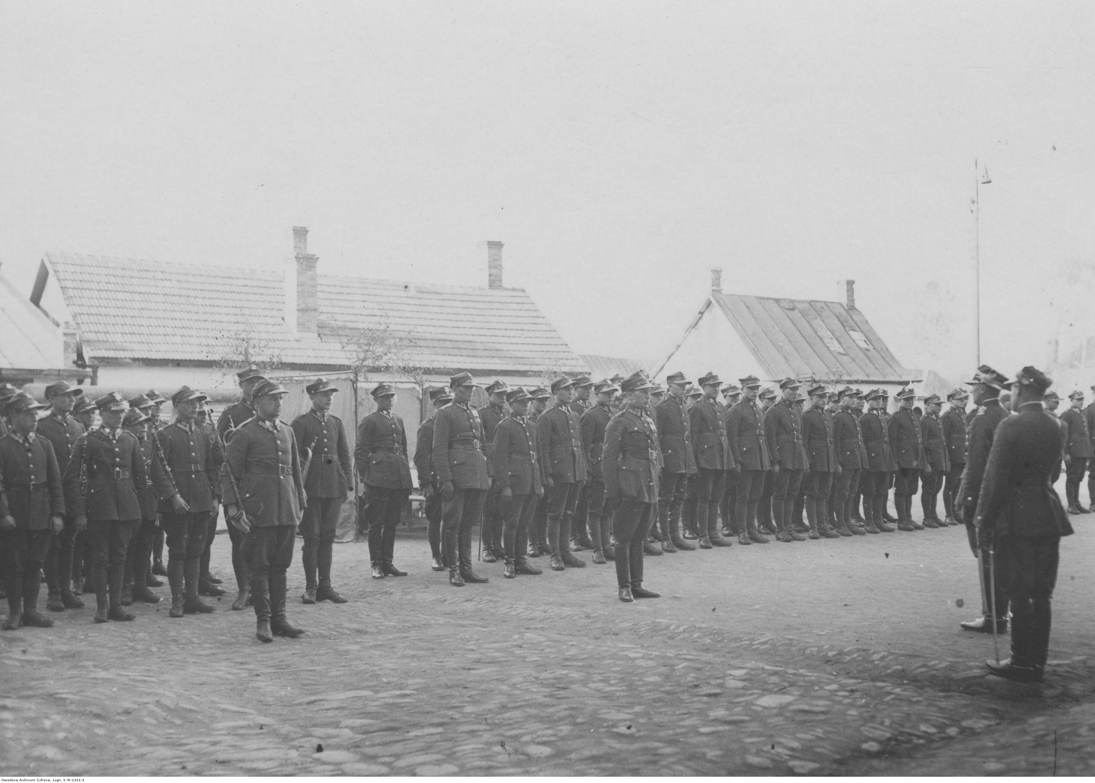 Odsłonięcie tablicy pamiątkowej w Nowym Sączu ku czci żołnierzy 1 Pułku Strzelców Podhalańskich poległych w 1920 roku - raport plutonu podczas uroczystości.Koncern Ilustrowany Kurier Codzienny - Archiwum Ilustracji. Sygnatura: 1-W-1311-1